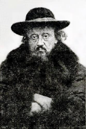 Ребе Аарон Менахем Мендл Айхенштайн из Алеска (Олесько), умер во Львове в 1923 г.